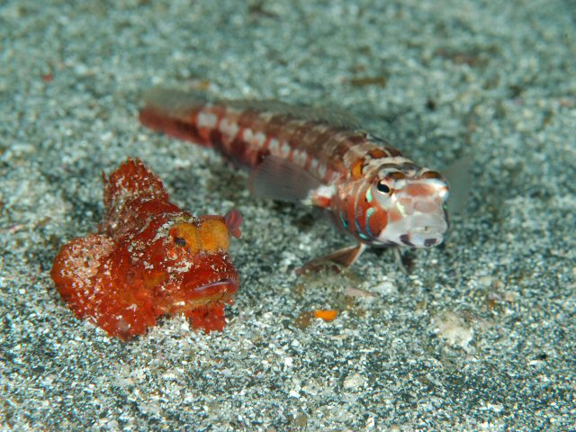 ヒメサツマカサゴ Scorpaenopsis cotticeps & トラギス Parapercis pulchella